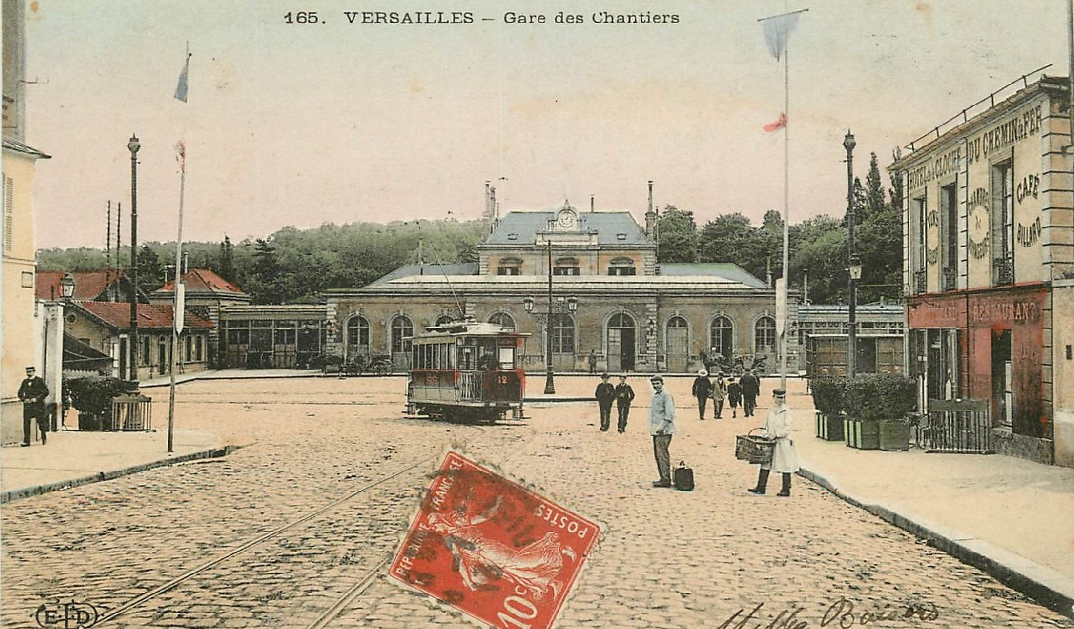 L'ancienne gare de Versailles-Chantiers, remplacée en 1932 par une nouvelle gare (carte postale photochrome).